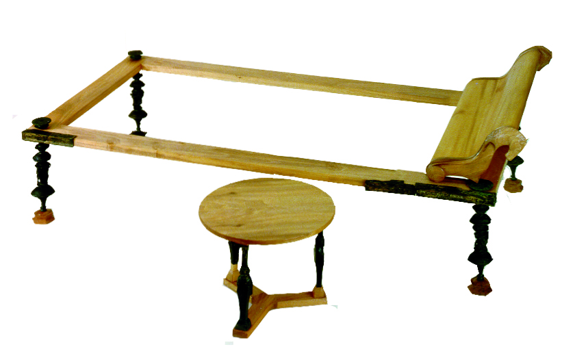 ricostruzione di letto triclinare e tavolino